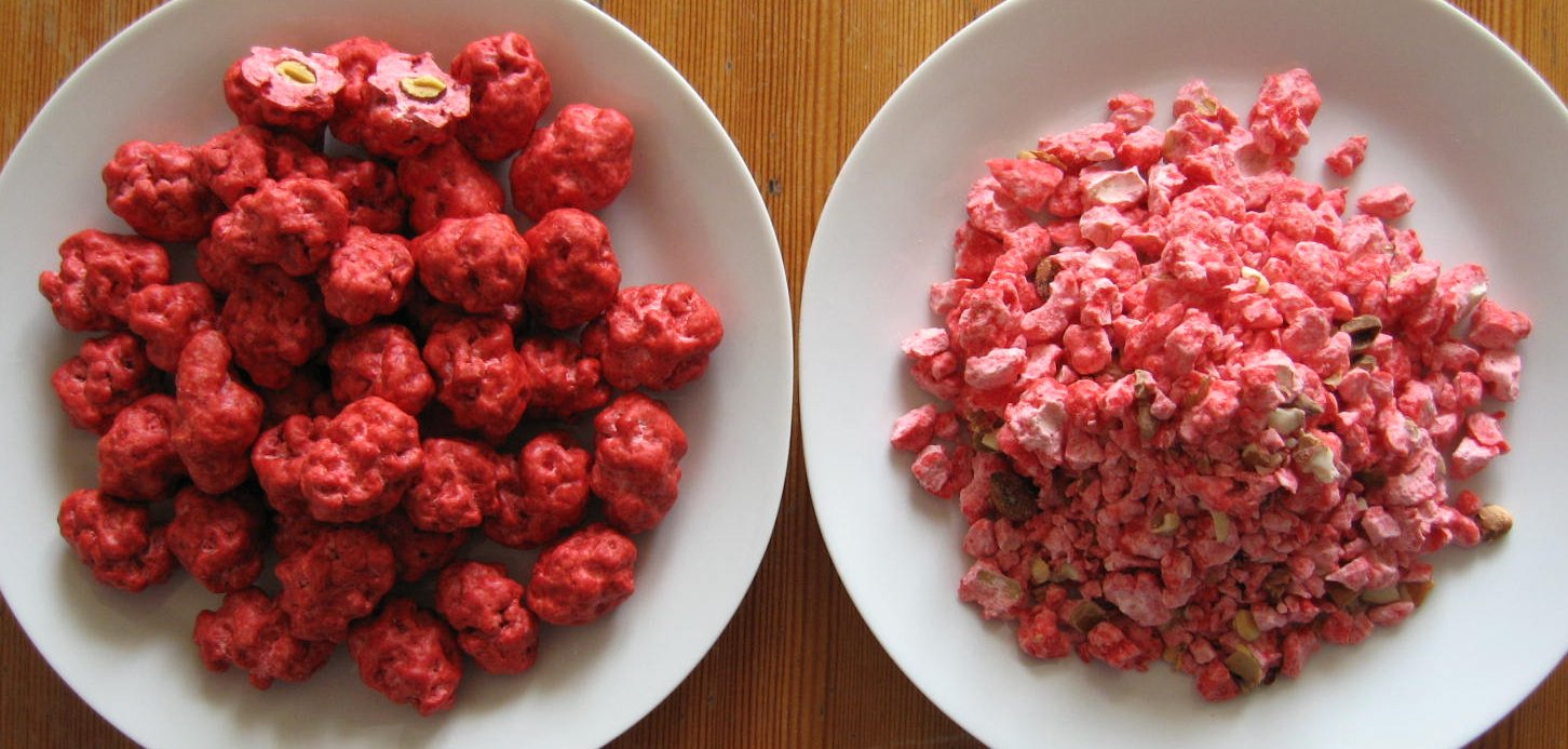 Pralines roses (bonbons constitués par une amande enveloppée de sucre cuit) entières ou concassées.